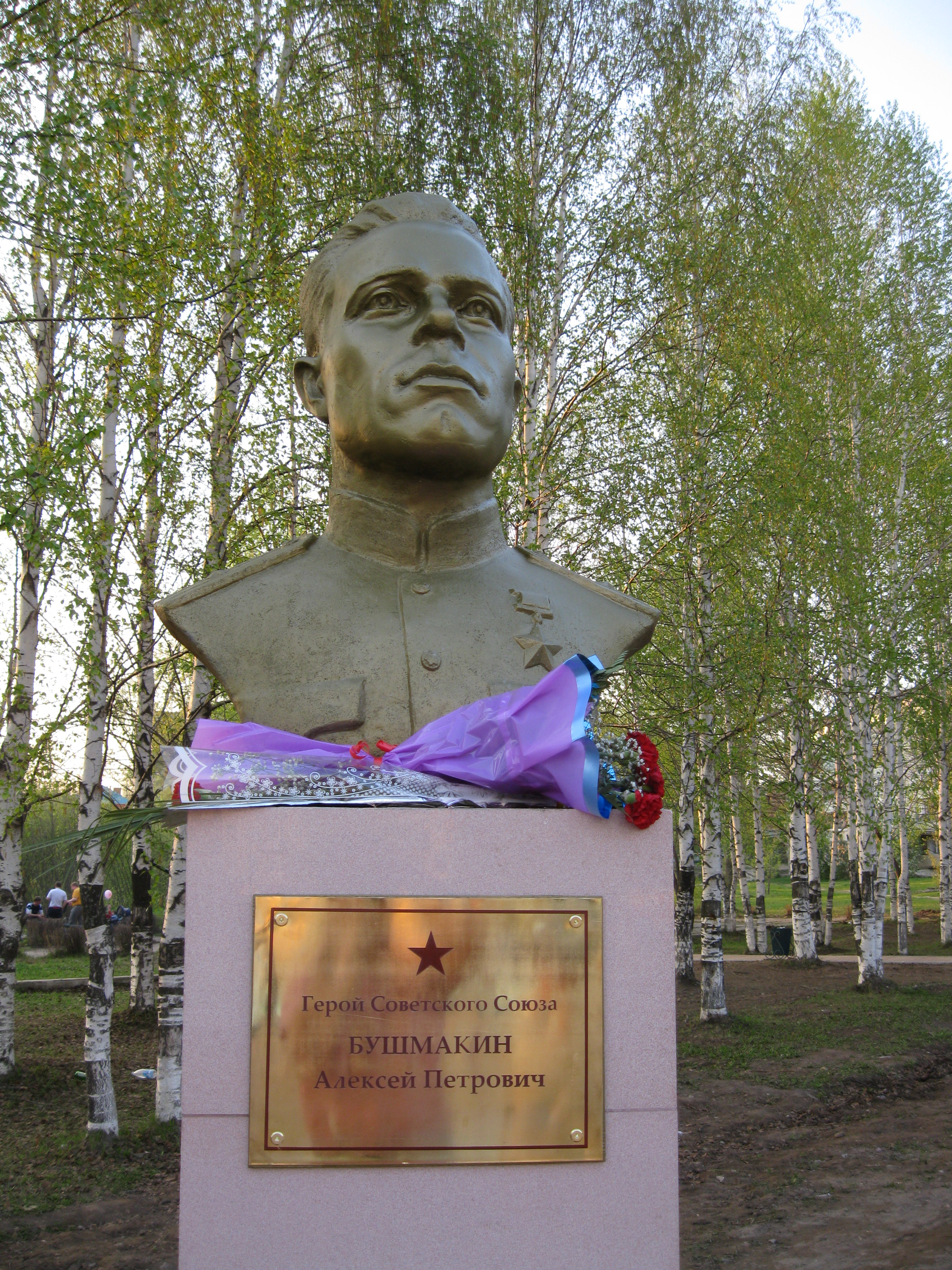 Бюст Алексея Петровича Бушмакина на Аллее Славы, открытой 09.05.2010 года в городе Чернушка.